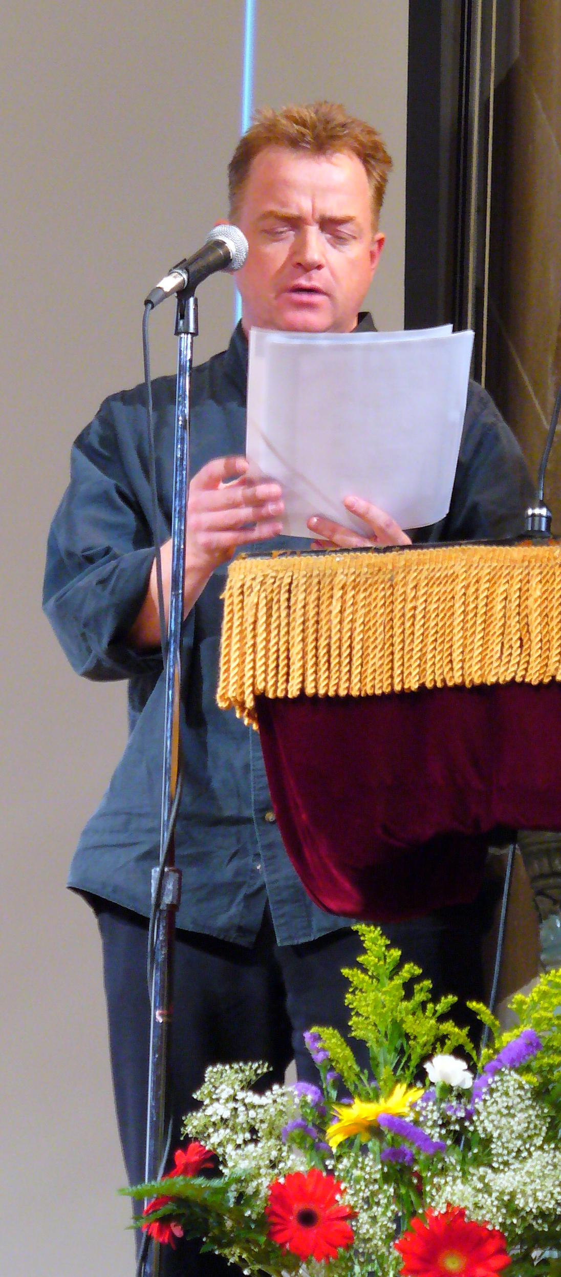 Glyn Maxwell by David Shankbone